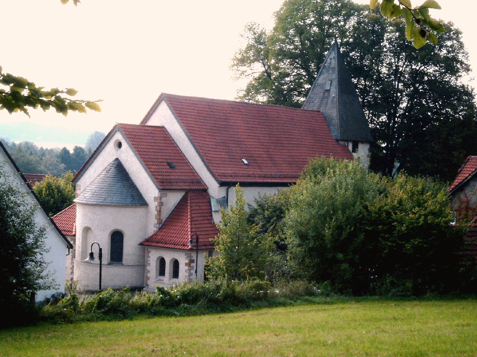 Die Holter Kirche aus dem sogenannten Franz Hecker-Blick.